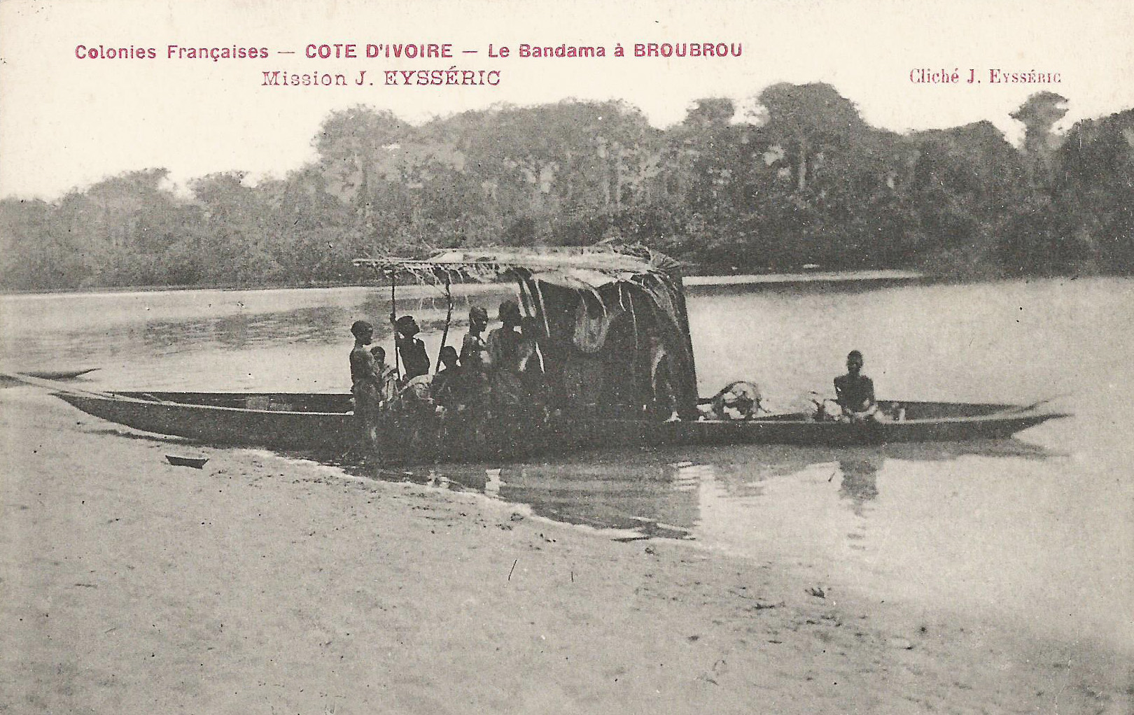 Le Bandama à Broubrou. Mission J. Eysséric. Colonies françaises. Côte d'Ivoire